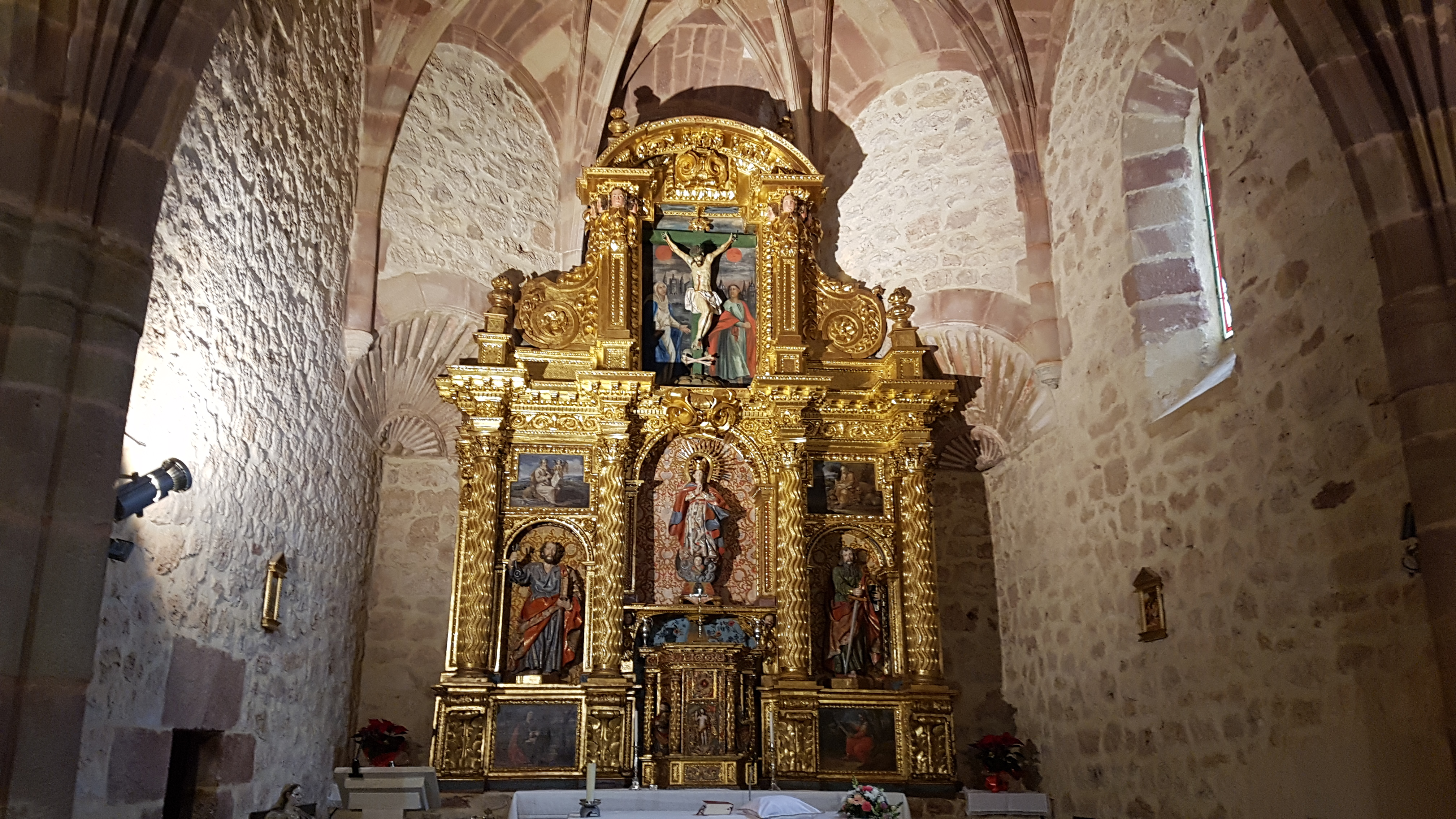 Retablo Mayor Barroco de la Iglesia de Cuzcurrita de Juarros (Burgos-España)